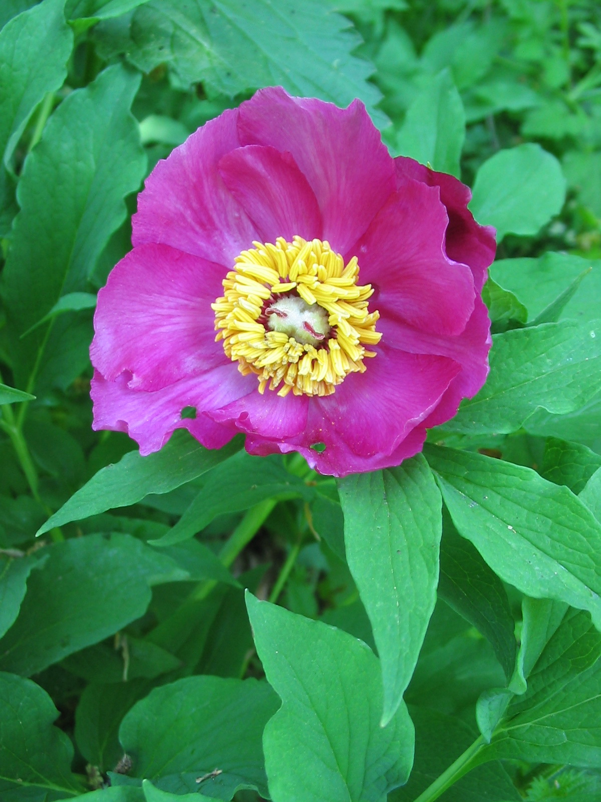 bánáti bazsarózsa (Paeonia officinalis ssp. banatica)